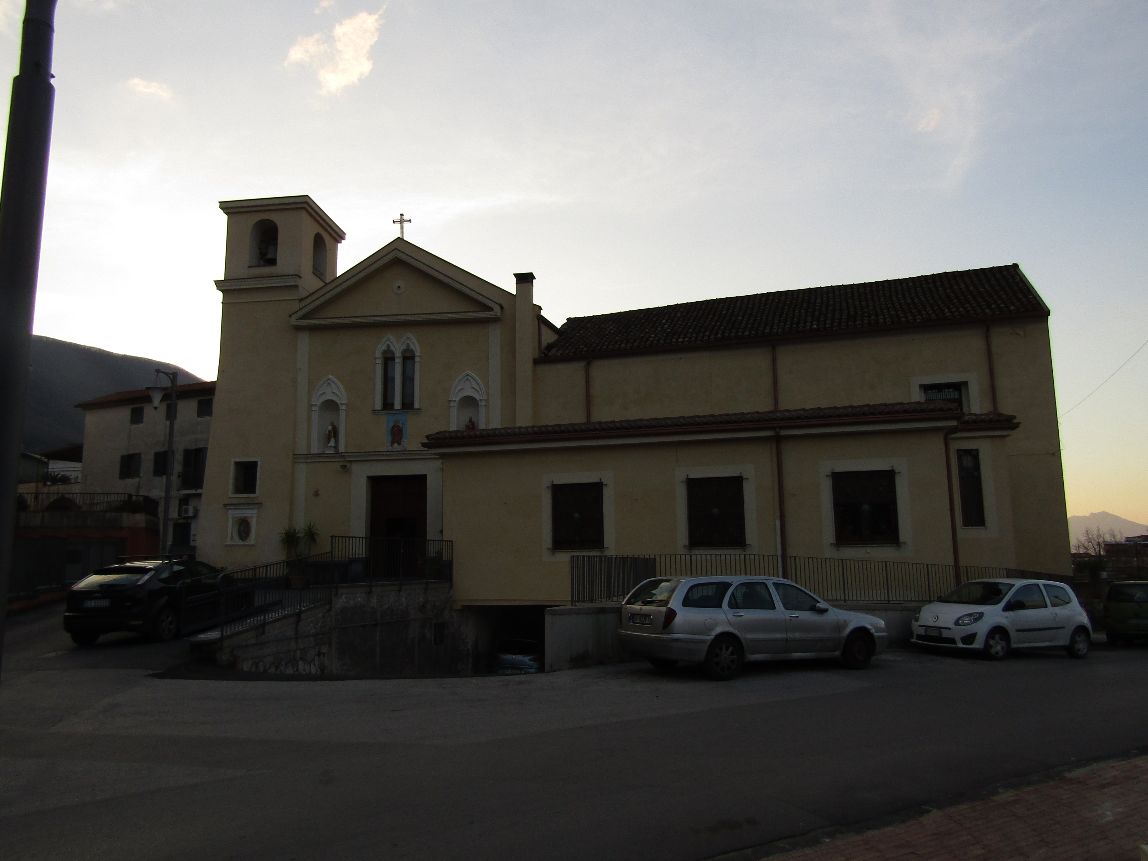 Template:Informazioni file